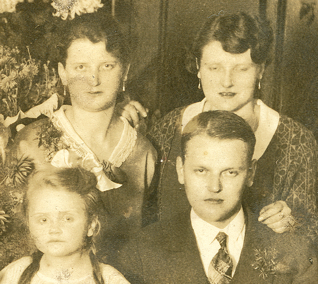 Die spätere Widerstandskämpferin Grete Hoell (hinten rechts als junge Frau) und ihre drei Geschwister in der Bäckerei und Conditorei Fritz Baumgarten (Mitglied des Rabattsparvereins) in der damaligen Herrenhäuser Straße 48 (heute: Stöckener Straße 21).